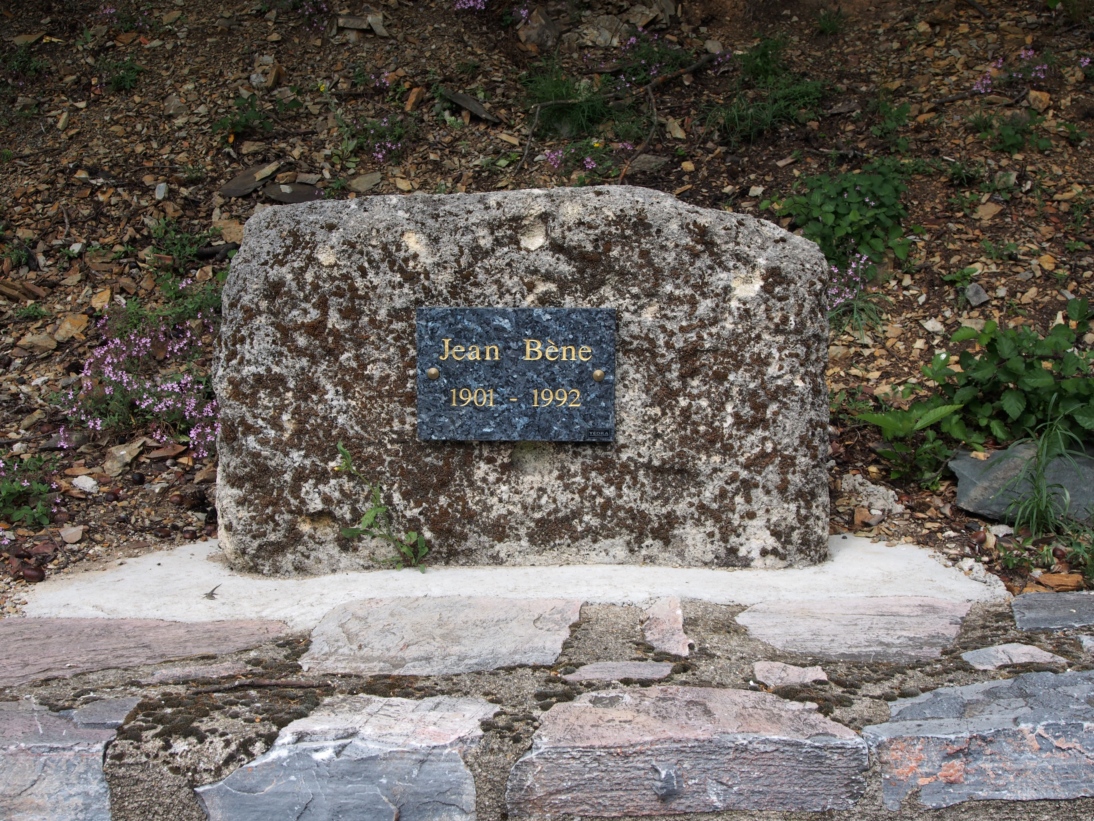 Plaque commémorative Jean Bène (1901-1992) à Ferrières-Poussarou (Hérault)